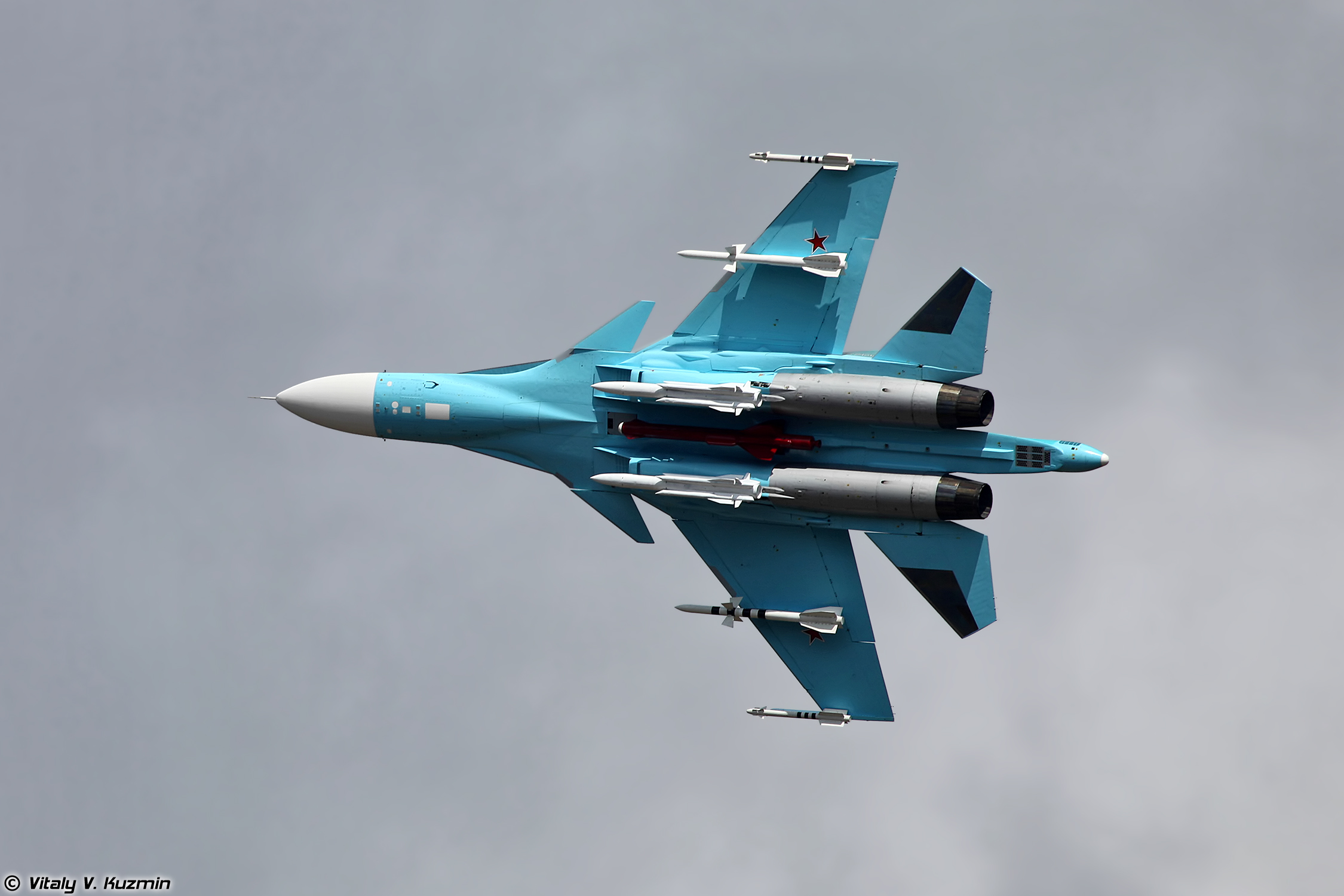 Су-34 (Su-34)